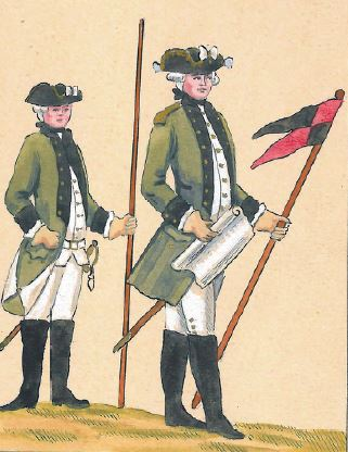 28. Korpus inżynieryjny (szeregowy i oficer korpusu inżynierów koronnych